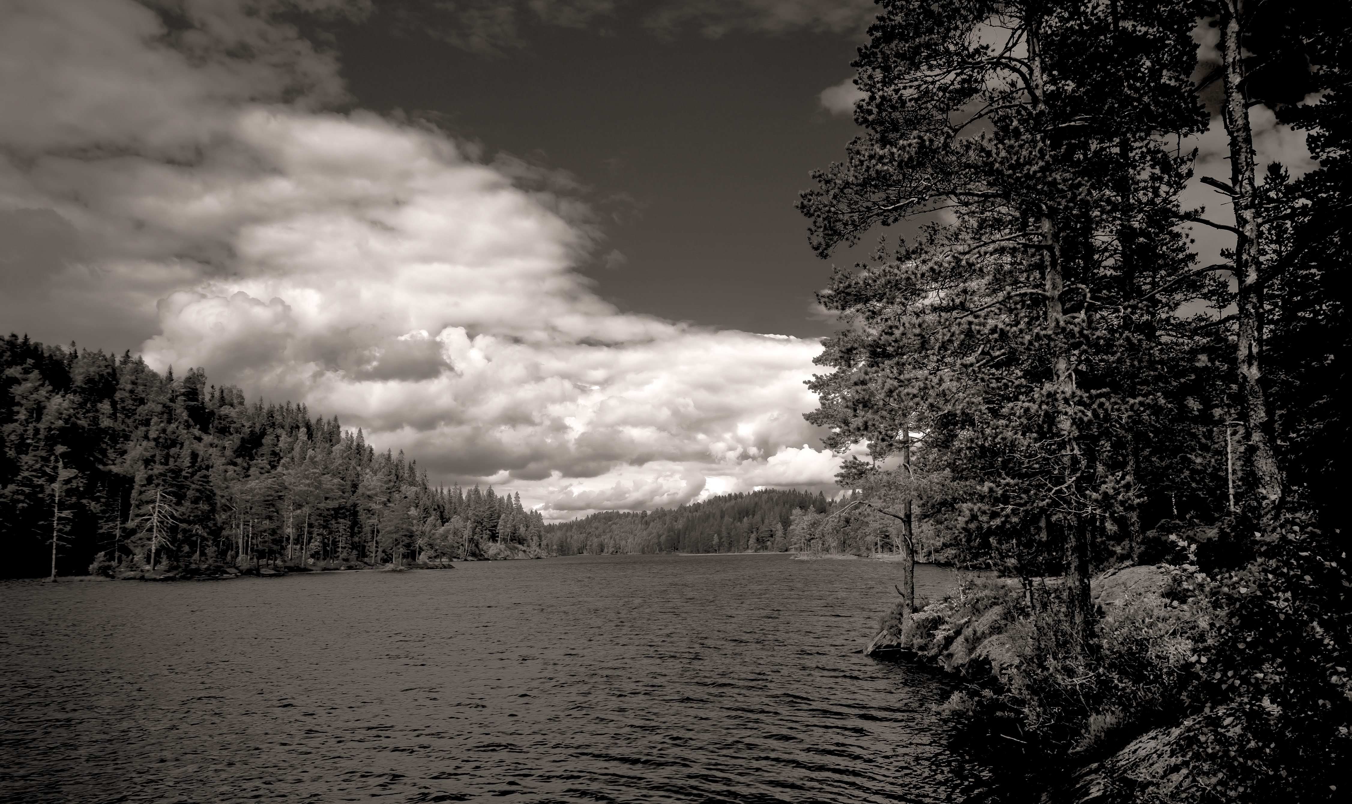 Gjeddevann , Enebakk